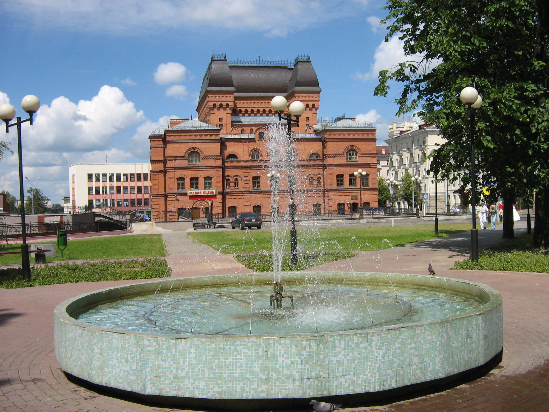 Могилев. Драмтеатр.